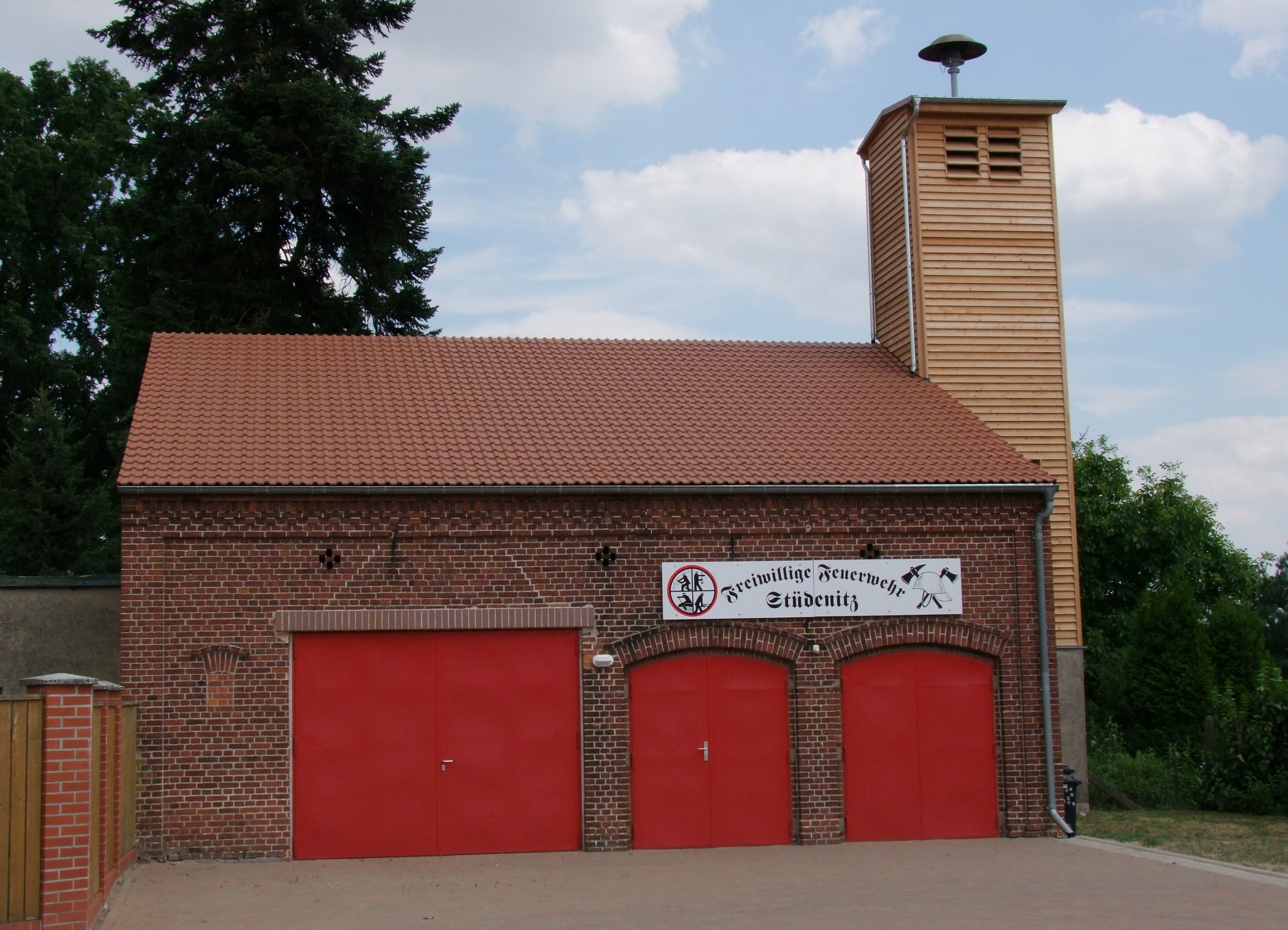 Das sanierte Gerätehaus der FFW Stüdenitz.